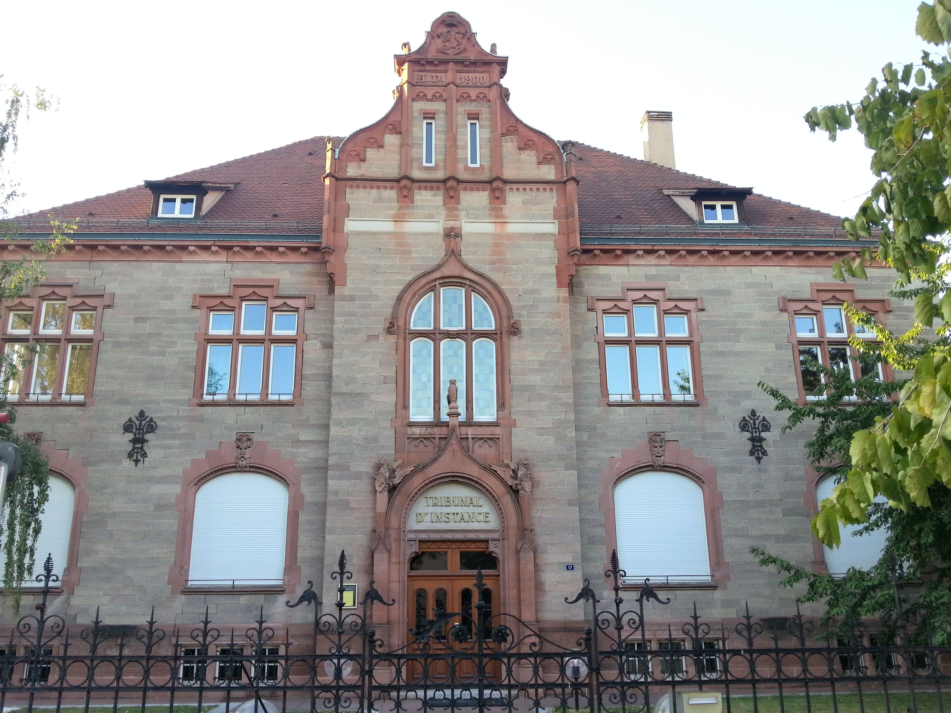 Tribunal d'instance, 17 rue de la Première-Armée (Inscrit, 1992) It is indexed in the Base Mérimée, a database of architectural heritage maintained by the French Ministry of Culture, under the references PA00085304 and IA00124599 .